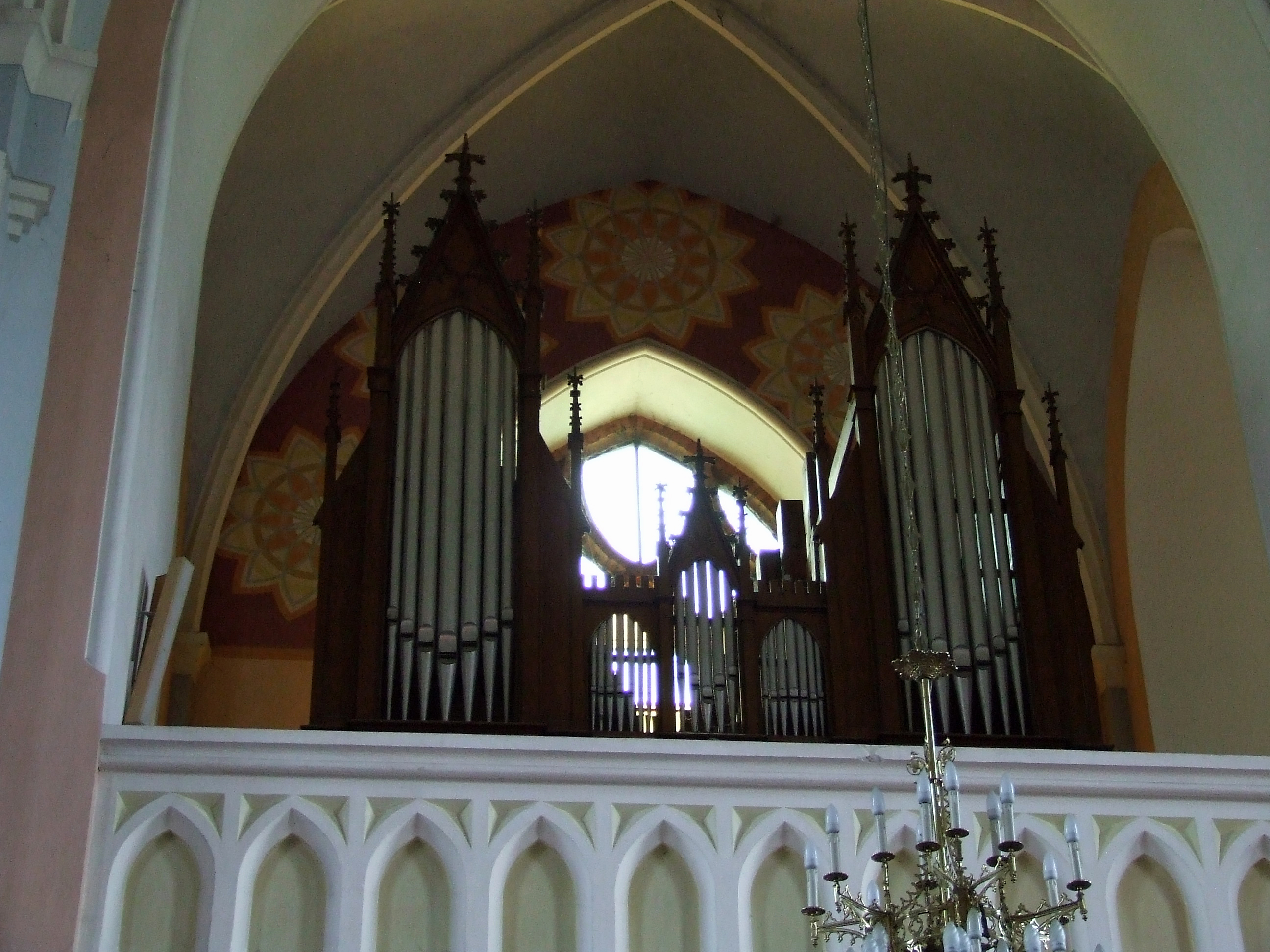 Organy w kościele w Baranowie